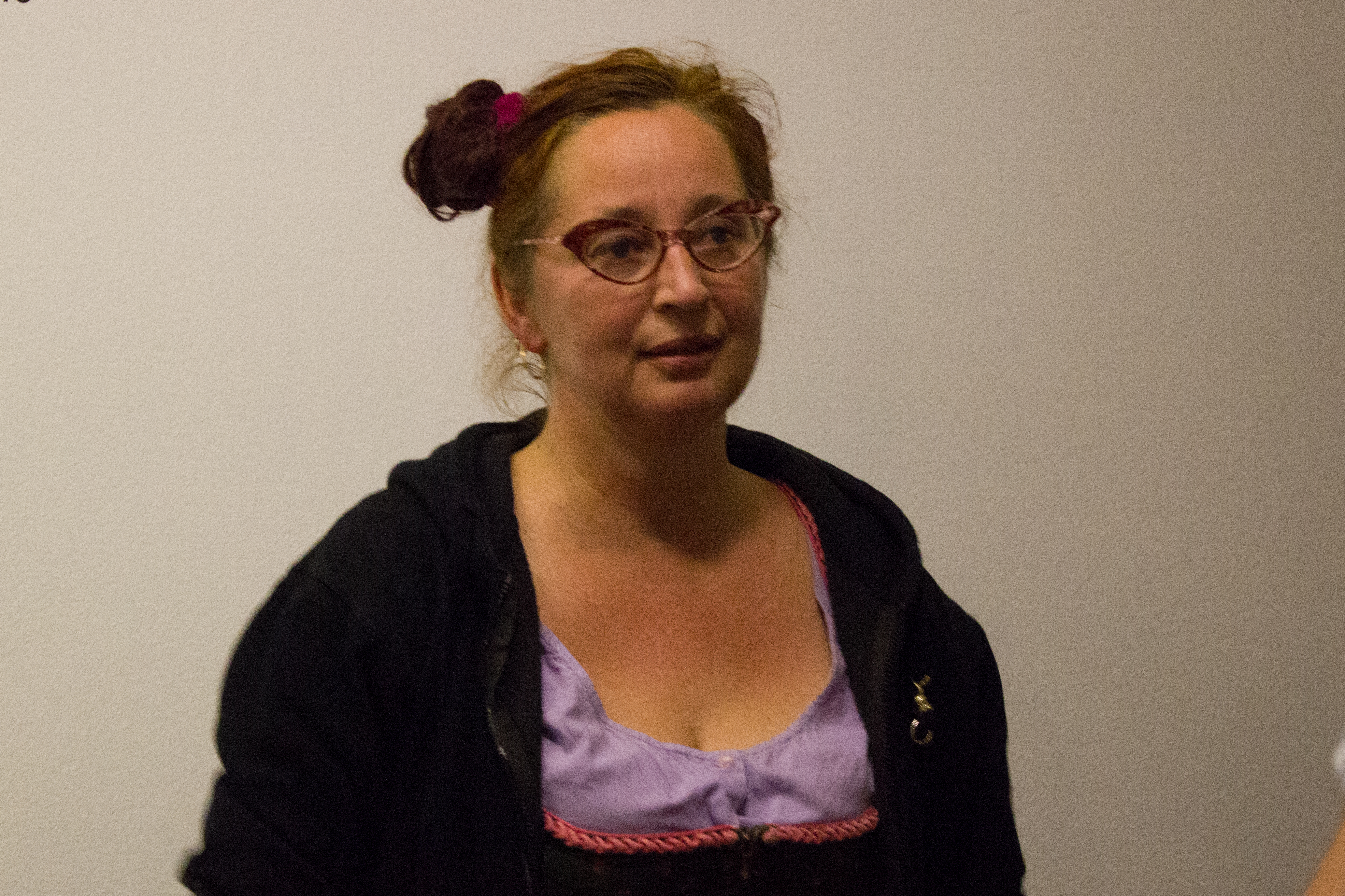 A directora alemá Dagie Brundert no festival AVANT 2015 en Kristinehamn, Suecia.